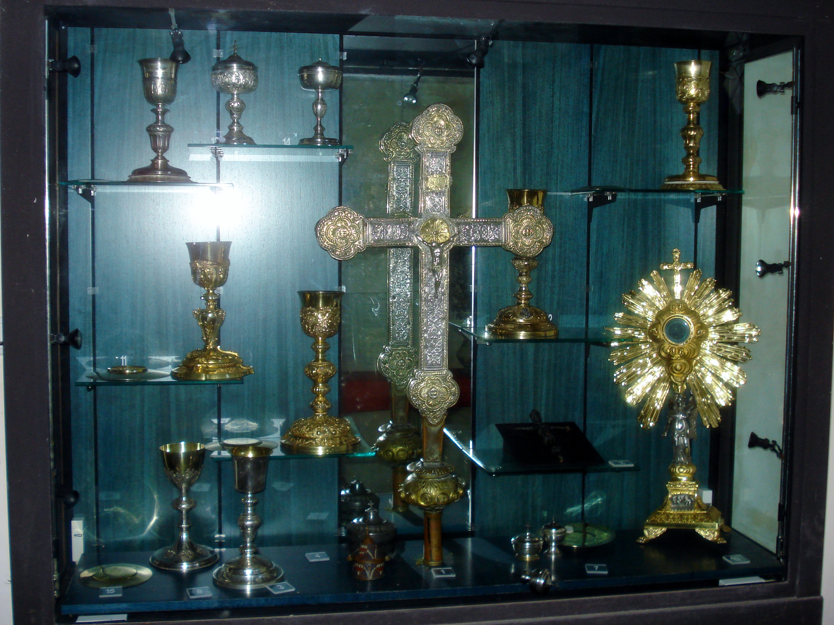 Estremeñu: Eglise de Lascelle dans le Cantal en France